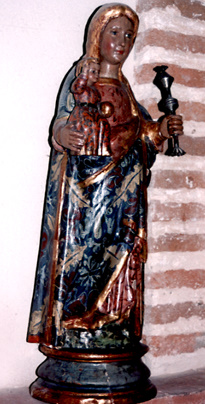 Virgen gótica de la Rochela, de la iglesia de San Andrés de Cuéllar